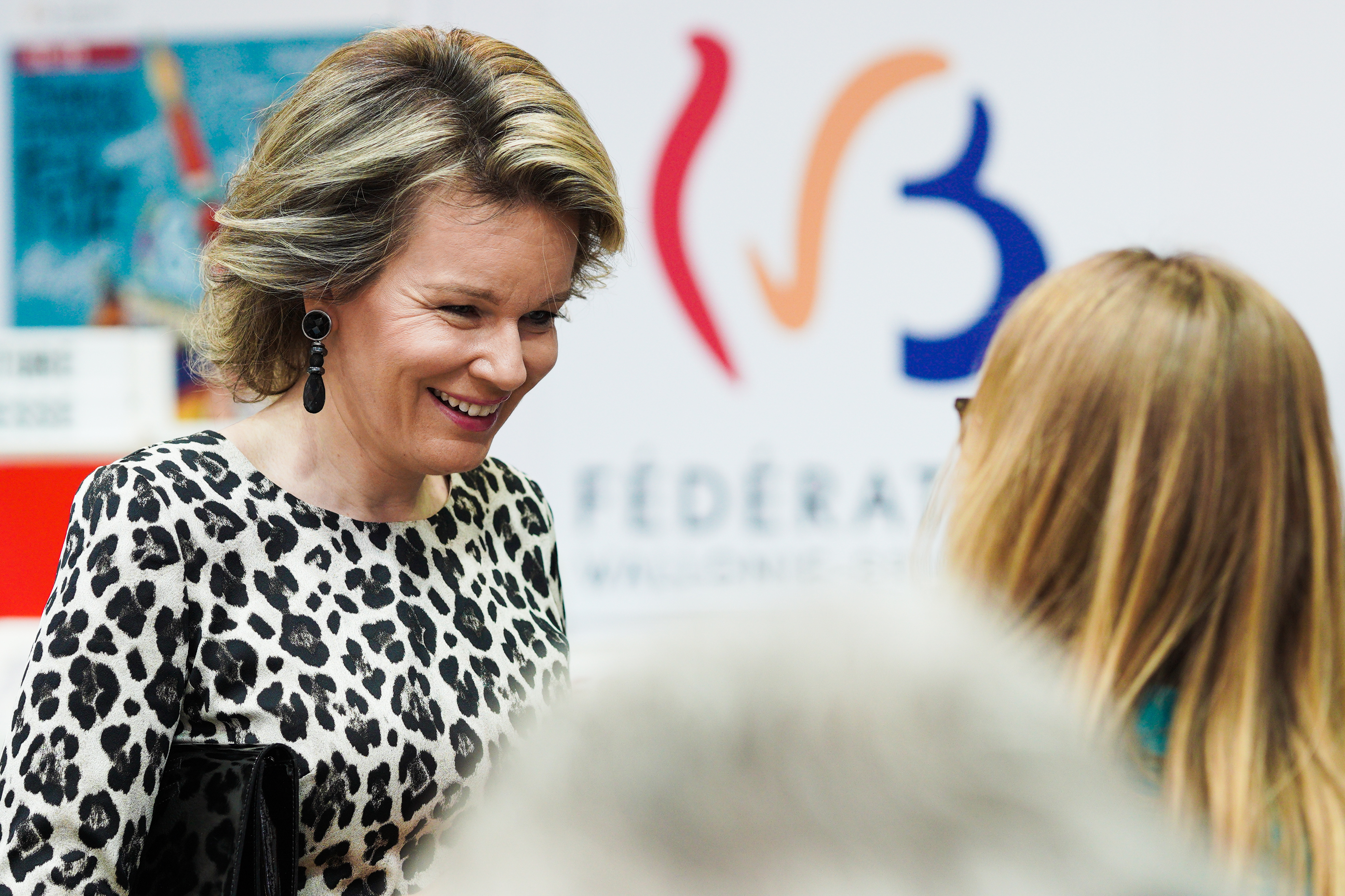 Mathilde d’Udekem d’Acoz, reine de Belgique, à la Foire du livre de Bruxelles 2019